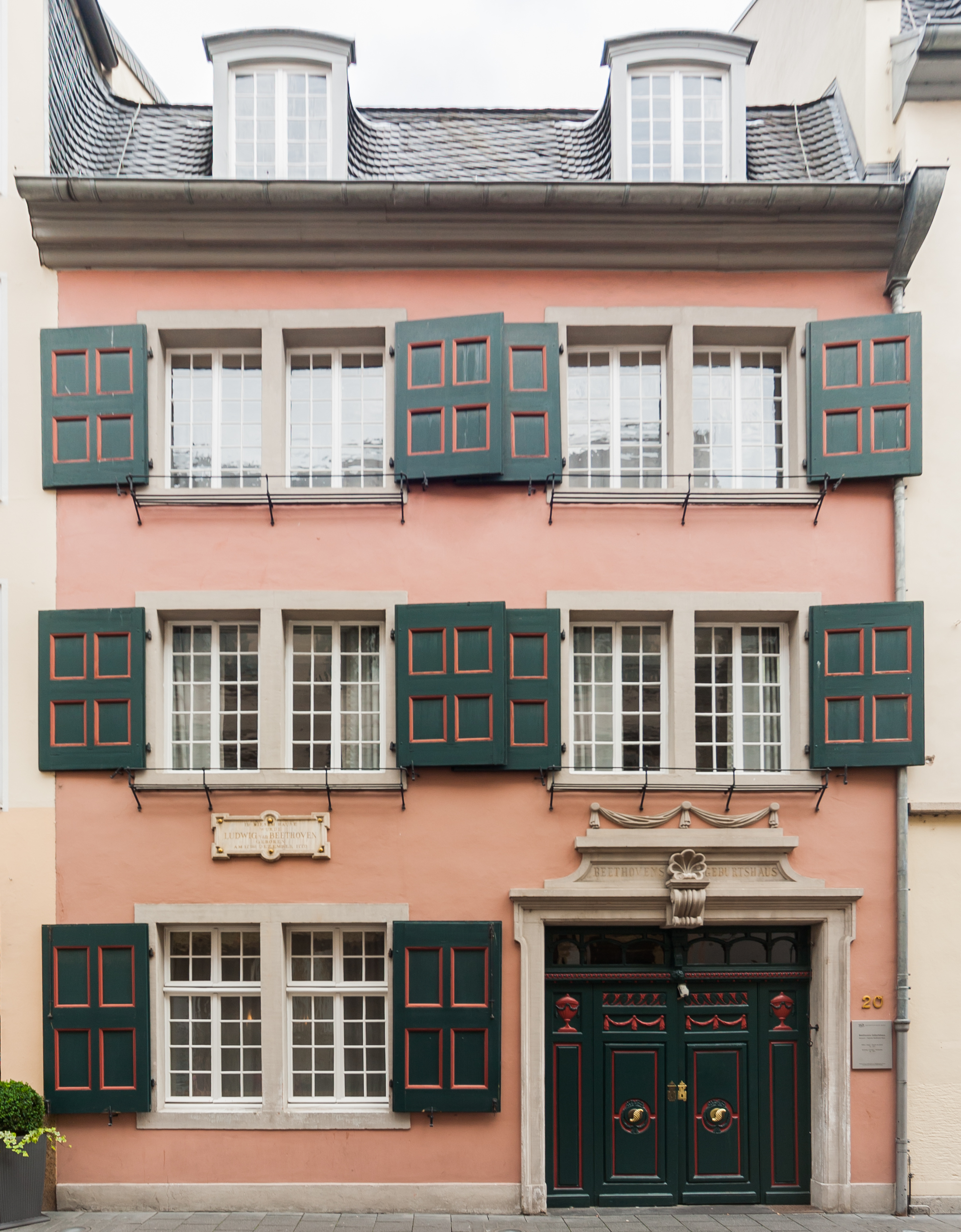 Beethoven House, Bonngasse 20, Bonn